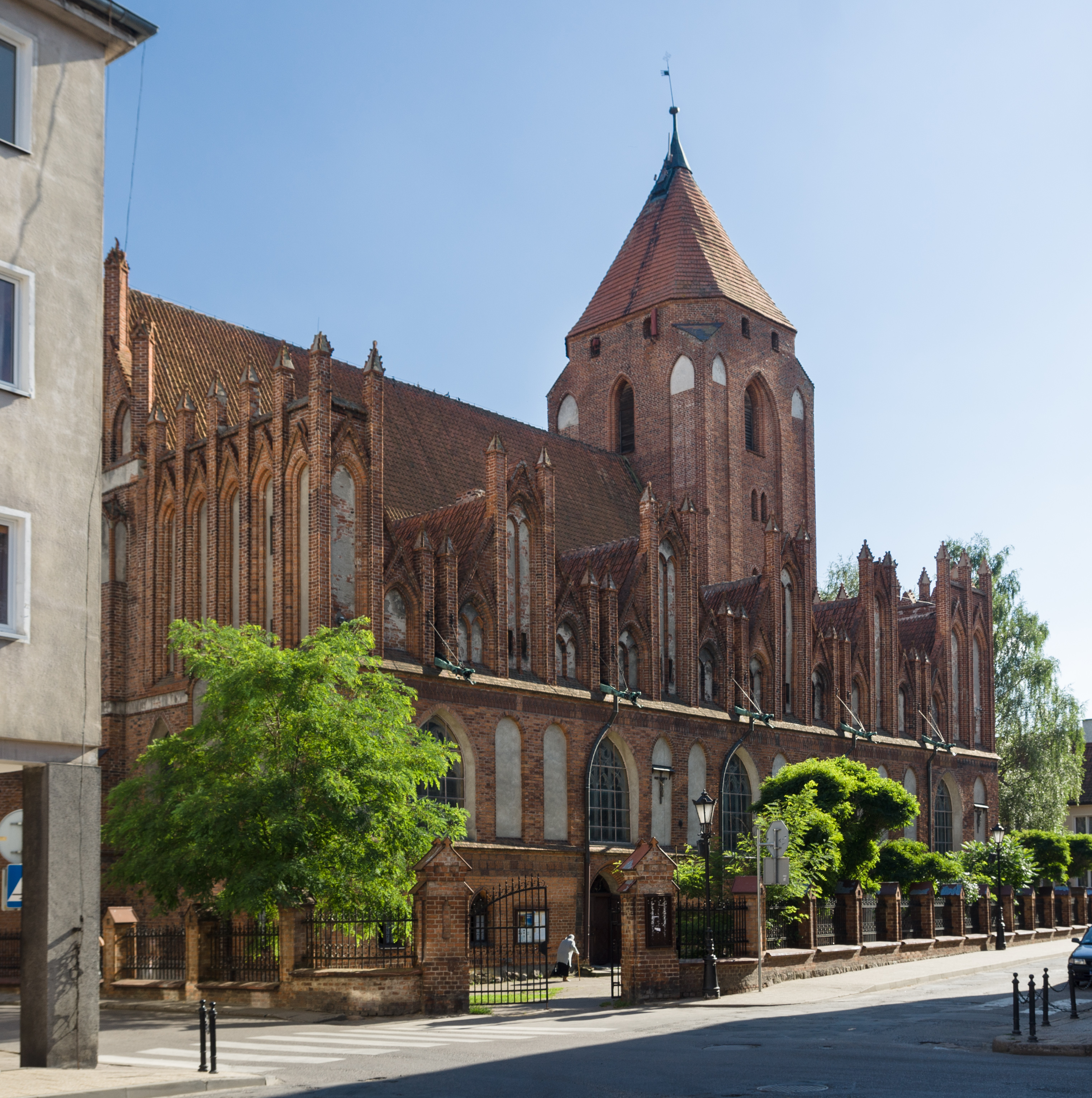 Kościół parafialny św. Jana Chrzciciela w Ornecie.